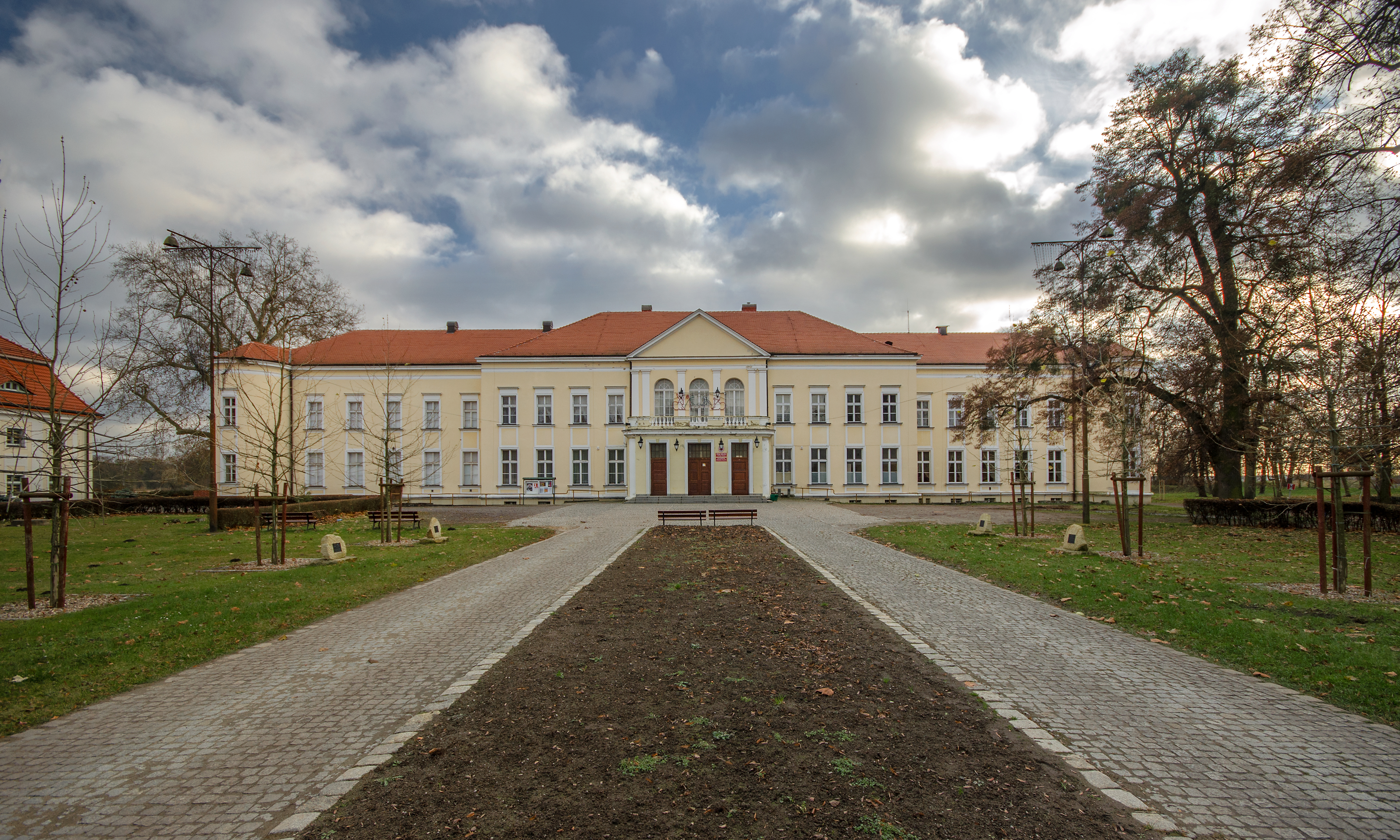 Brzeg Dolny, pałac, 1785-1790